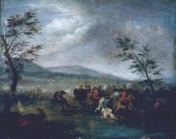 Batalla